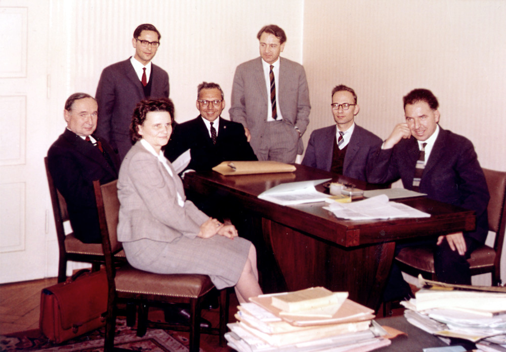 Gründungssitzung Müller-BBN